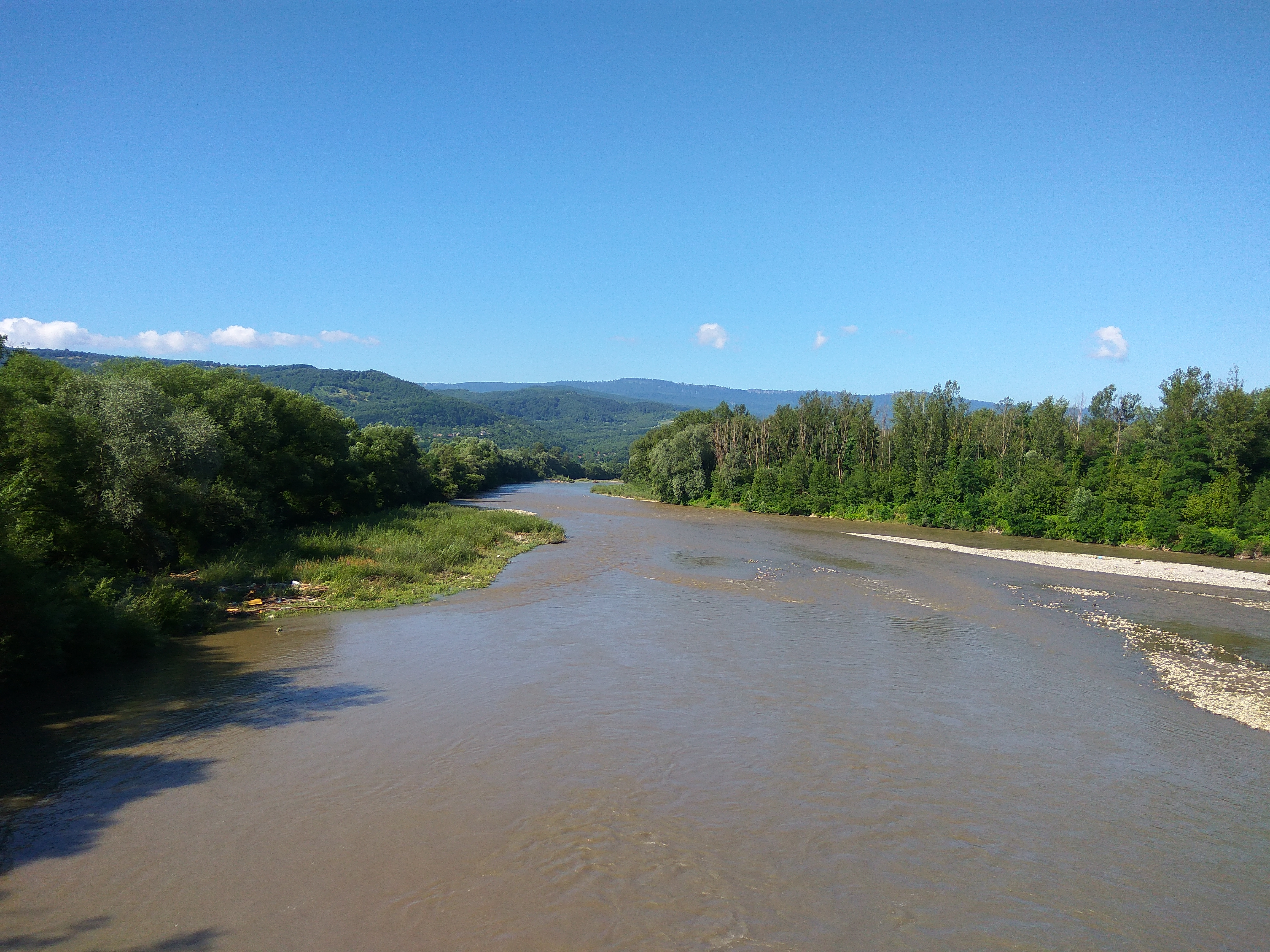 Річка Тиса між Солотвино та Сигітом